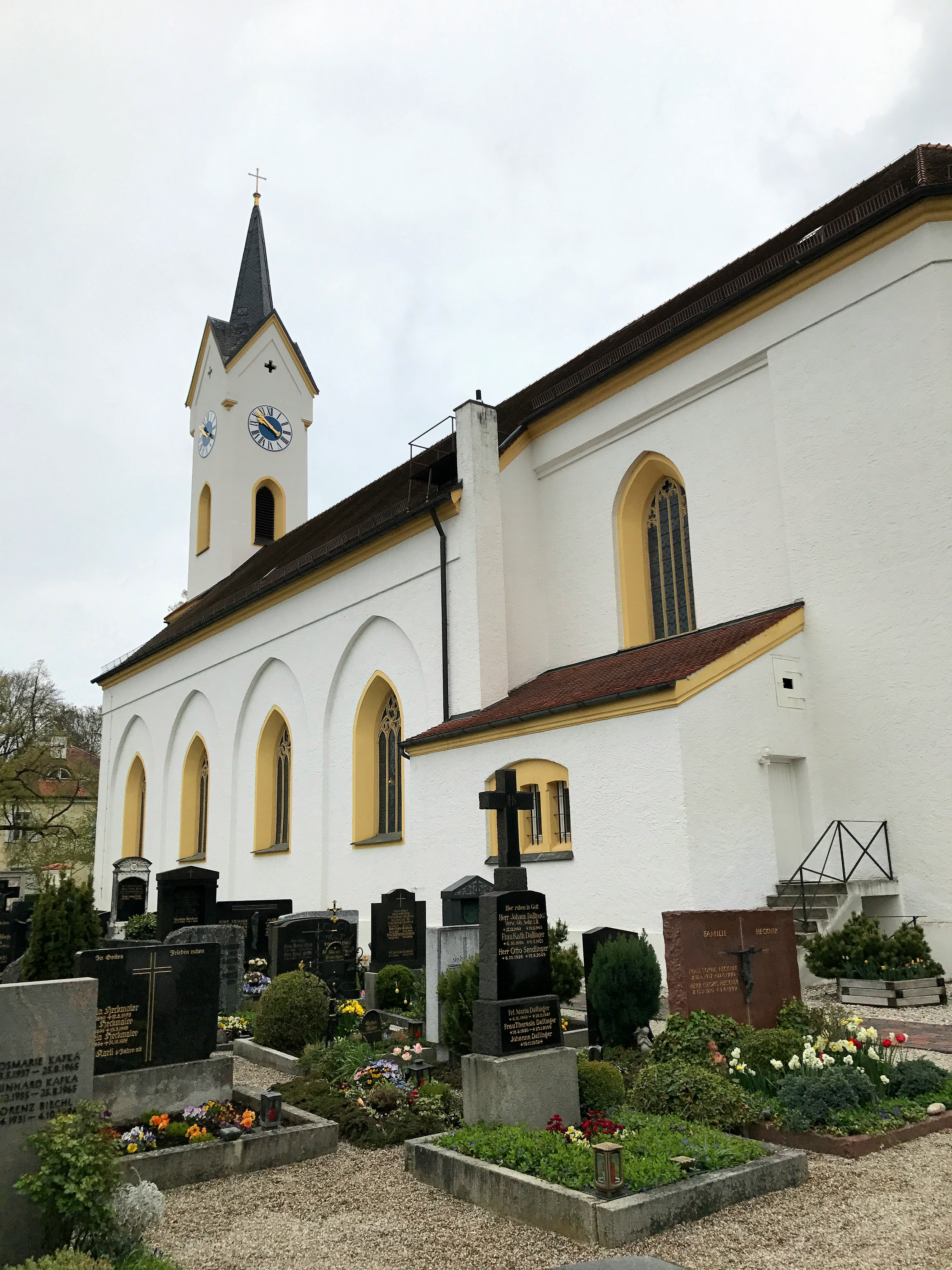 St. Jakob (Vötting)